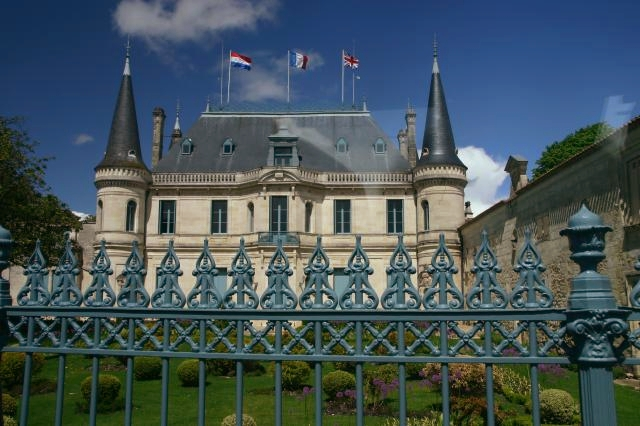 Chateau Palmer